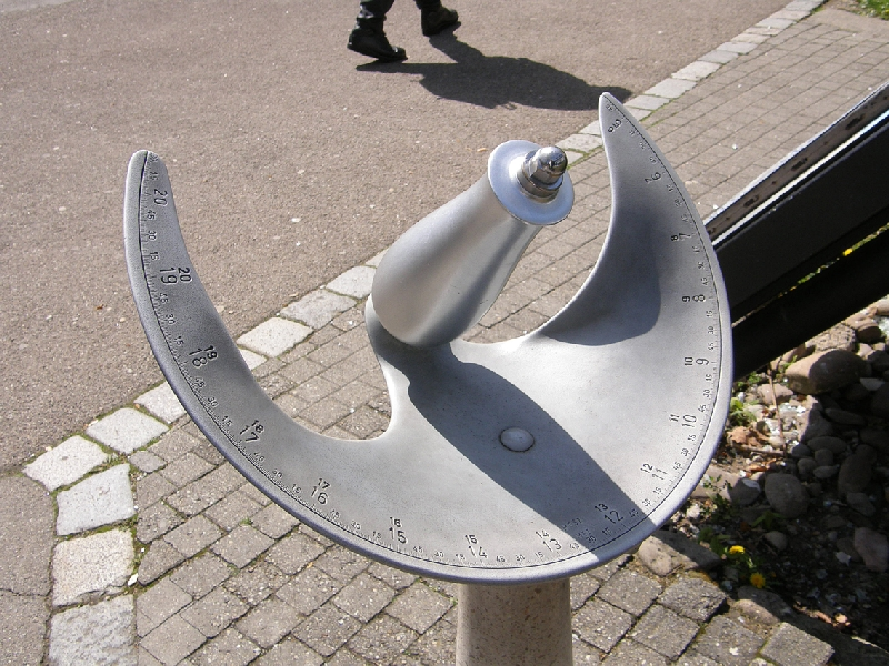 Die Präzisions-Sonnenuhr vor dem Gebäude des Carl Zeiss Planetariums in Stuttgart